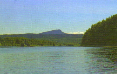 вид на Полюд